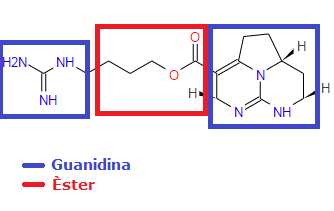 Estructura bàsica de la batzelladina C